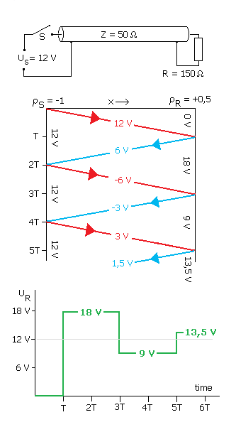 Lattice-Diagram (Impulsfahrplan) der Spannung am Ende einer Koaxleitung mit zu grossem Lastwiderstand (Reflexionsfaktor = +0,5). Eingespeist wird ein Spannungssprung von 1 V auf 12 V aus einer Quelle mit Innenwiderstand null Ohm. Im mittleren Bild ist der Ort des Sprunges (hor. Achse) als Funktion der Zeit (vertikale Achse) eingezeichnet.